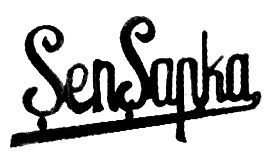 Vakko'nun temeli, 1934'te Vitali Hakko tarafından "Şen Şapka" adıyla kurulan, küçük bir şapkacı dükkanına dayanır.